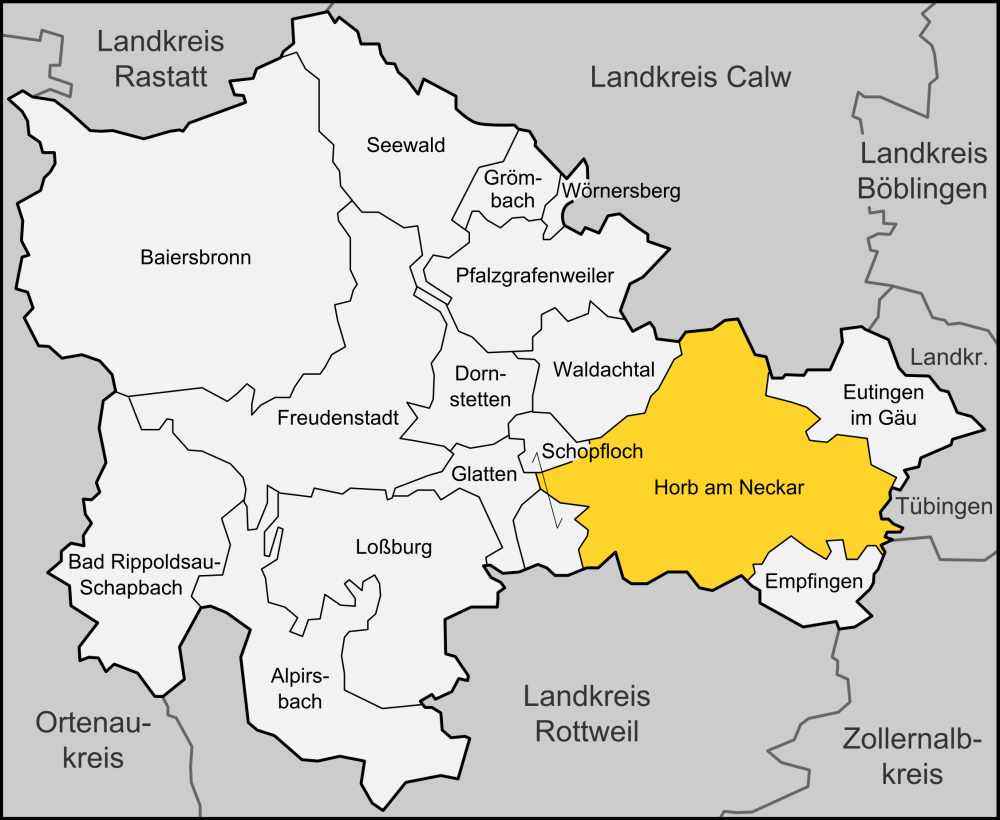 Karte der Stadt Horb am Neckar im Landkreises Freudenstadt